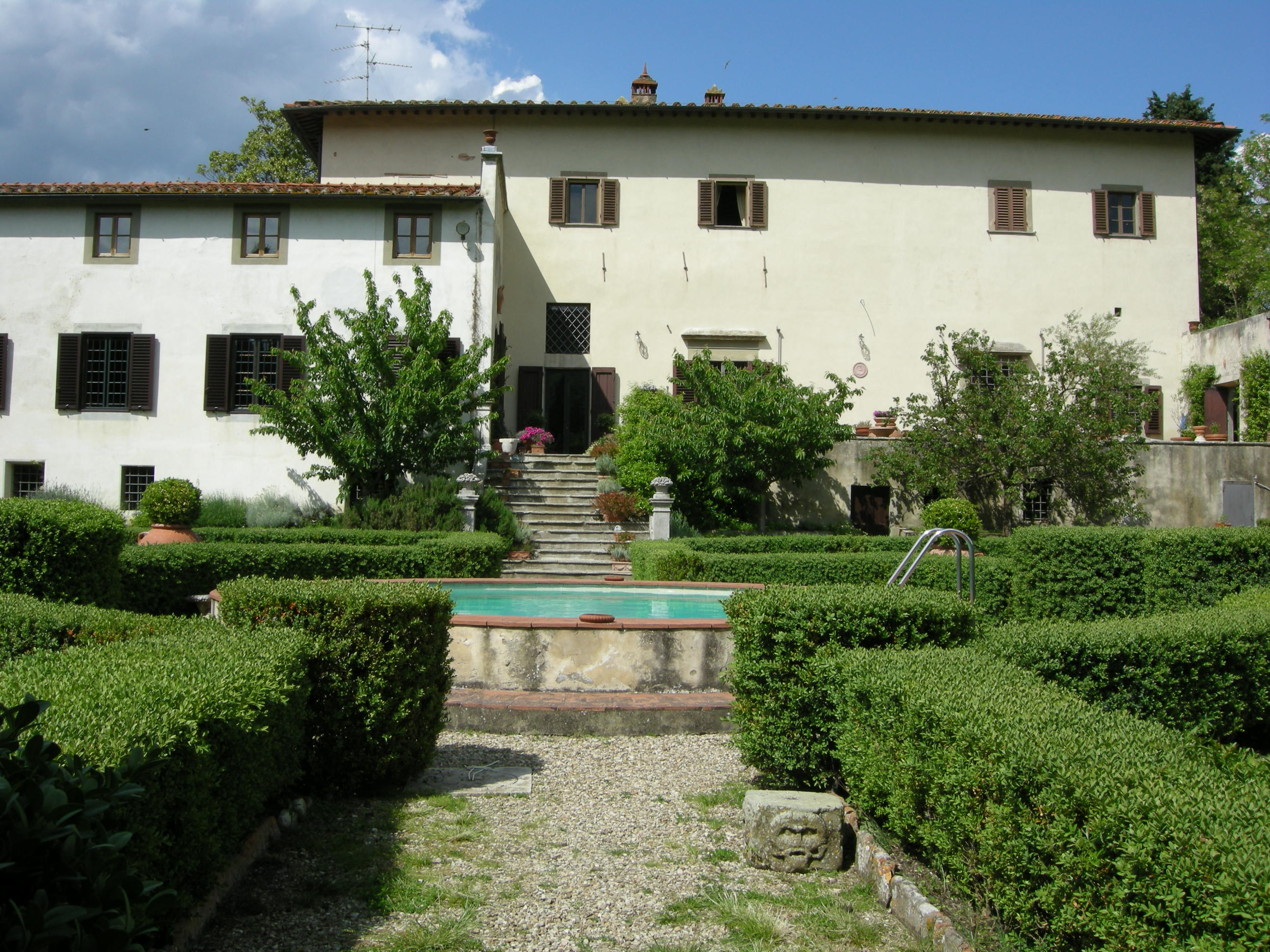 Villa il poggio di villamagna